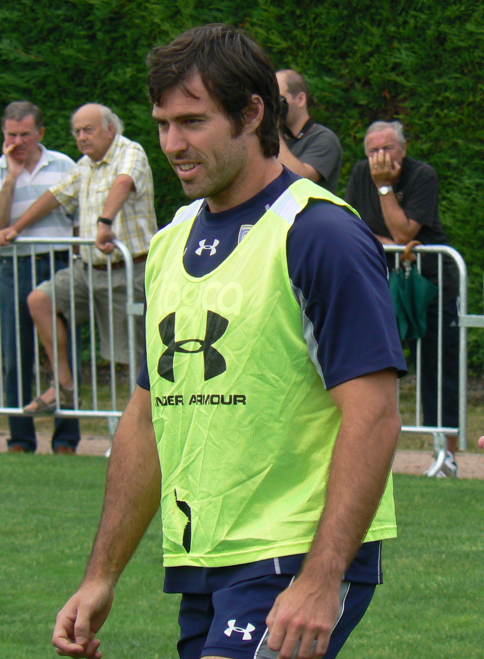 Le rugbyman australien Brock James lors d'un entraînement avec l'ASM Clermont Auvergne.